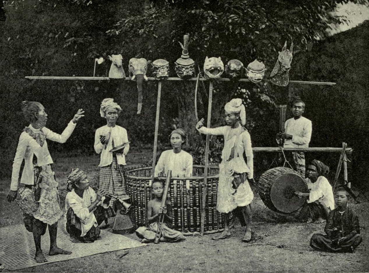 ビルマの音楽家